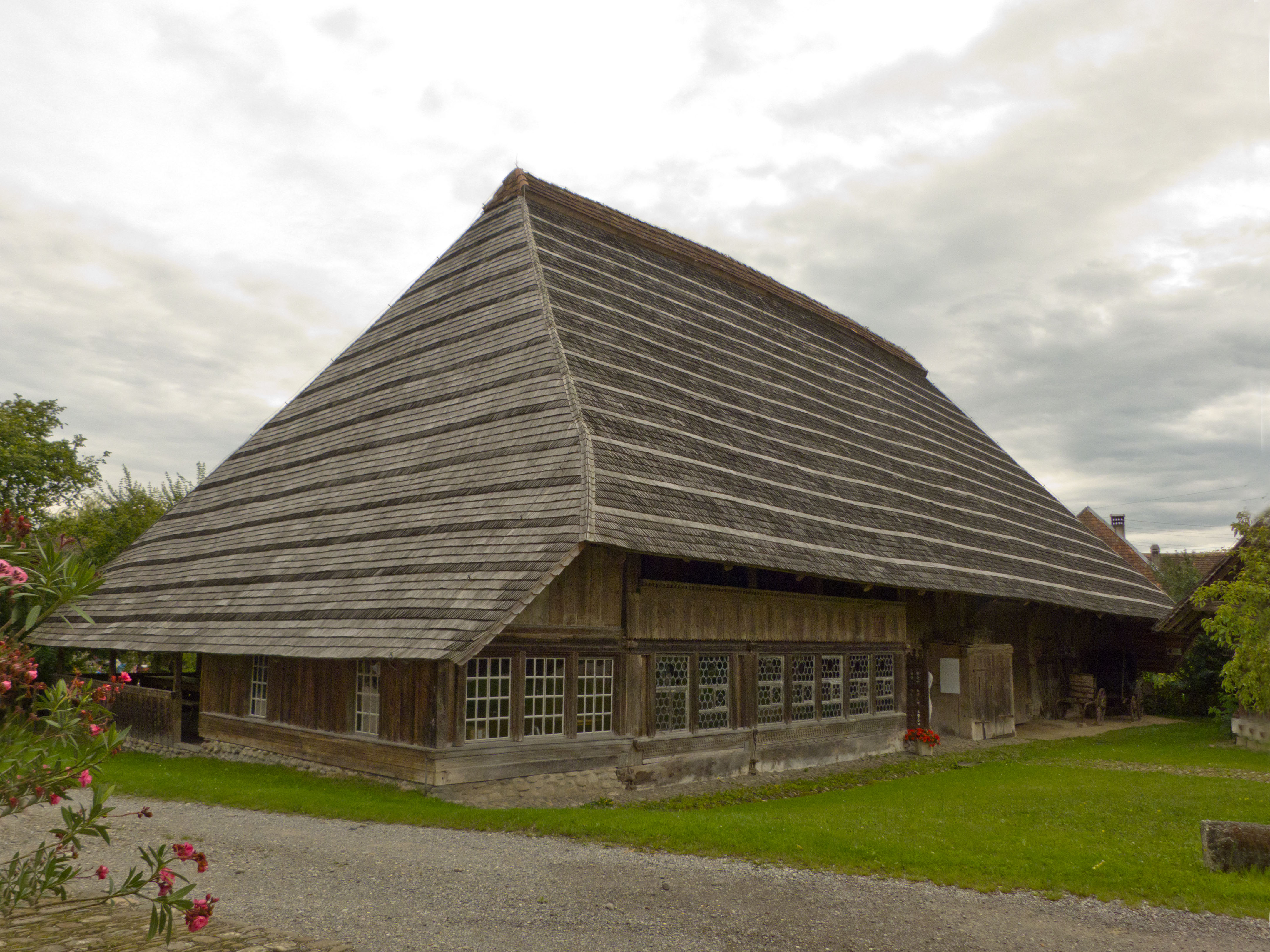 Althus, Bauernhausmuseum Jerisberghof, Gurbrü Ferenbalm